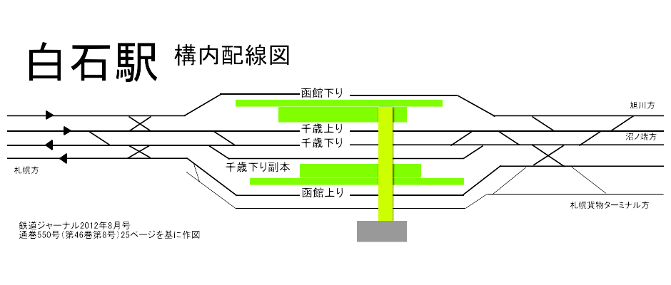 JR北海道白石駅構内配線図